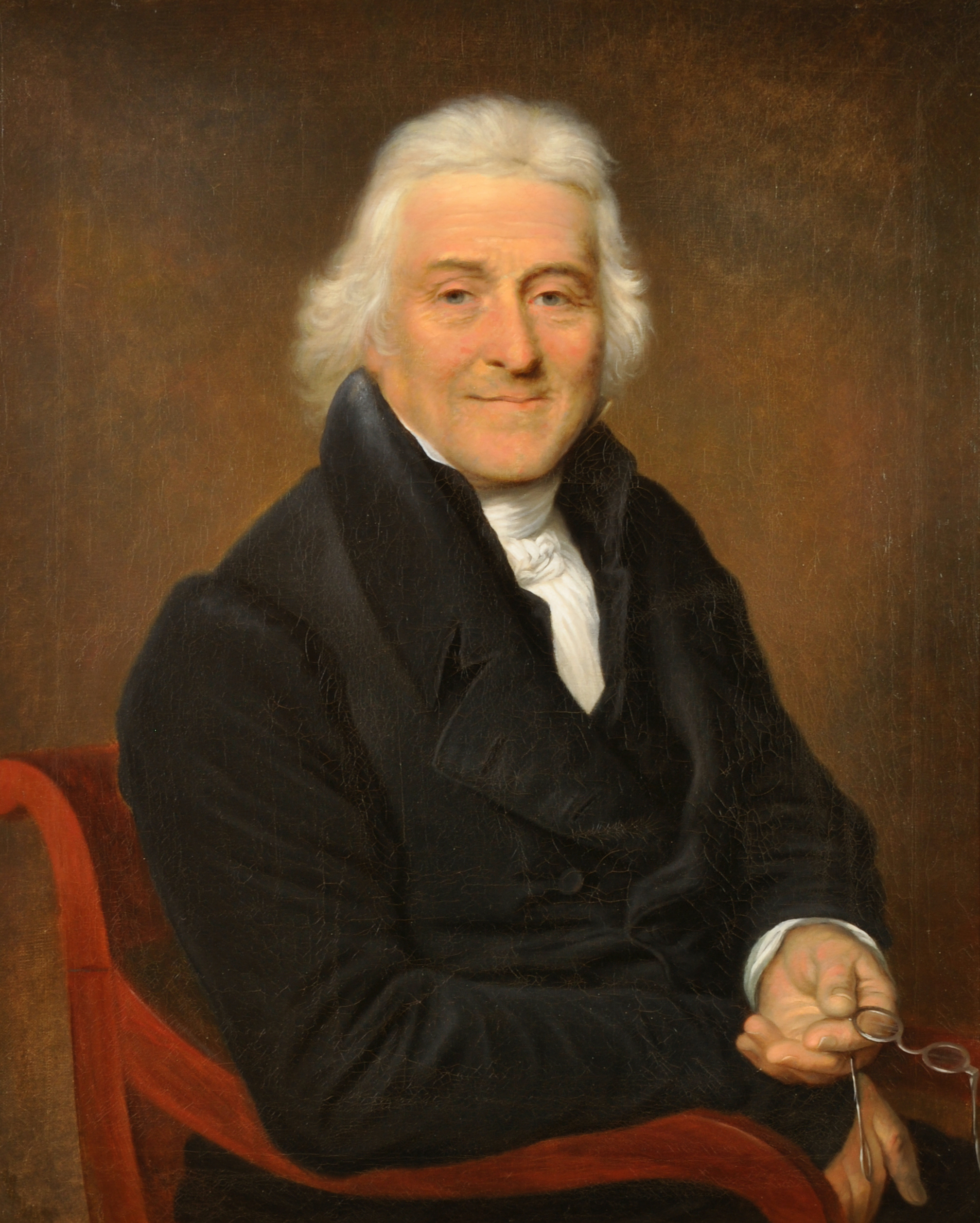 Adrianus Bonebakker (1767-1842)